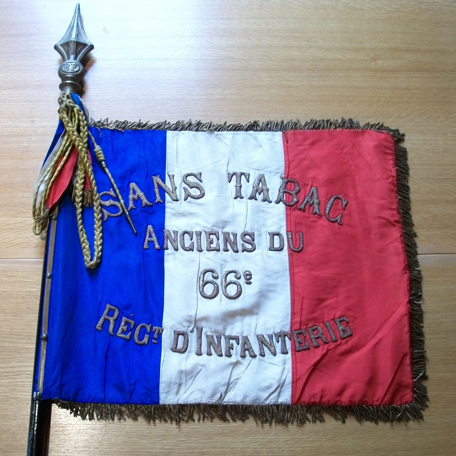 Drapeau des anciens combattant du 66e régiment d'infanterie..